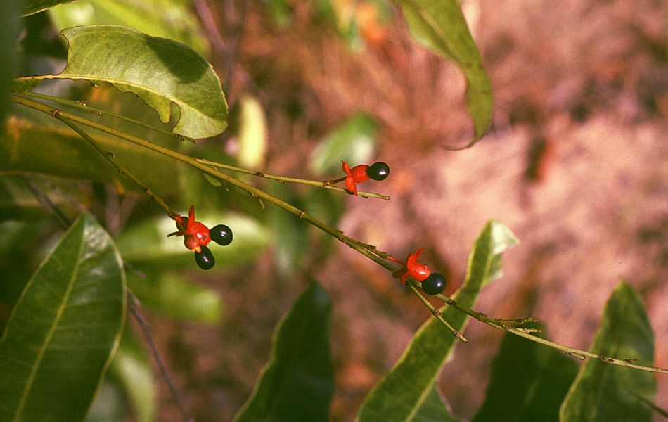 Campylospermum serratum, Ochnaceae - Kambodscha/Cambodia, bei den Stromschnellen (rapids) des Flusses Tek Chhou N Kampot (Prov. Kampot)